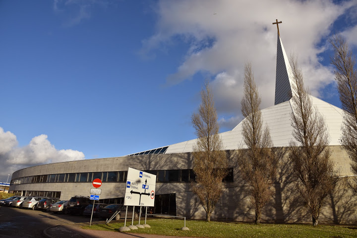 Balti Metodista Teológiai Főiskola Tallinban.